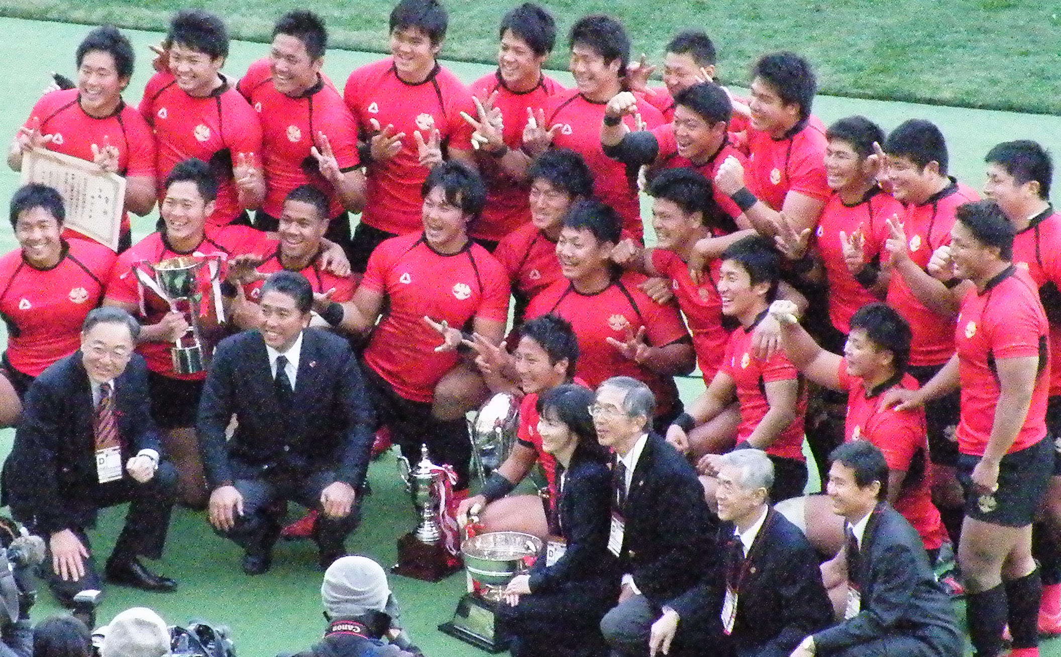 帝京大学ラグビー部 6連覇達成